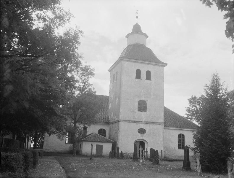 Kyrkan från norr. Snabbinv.